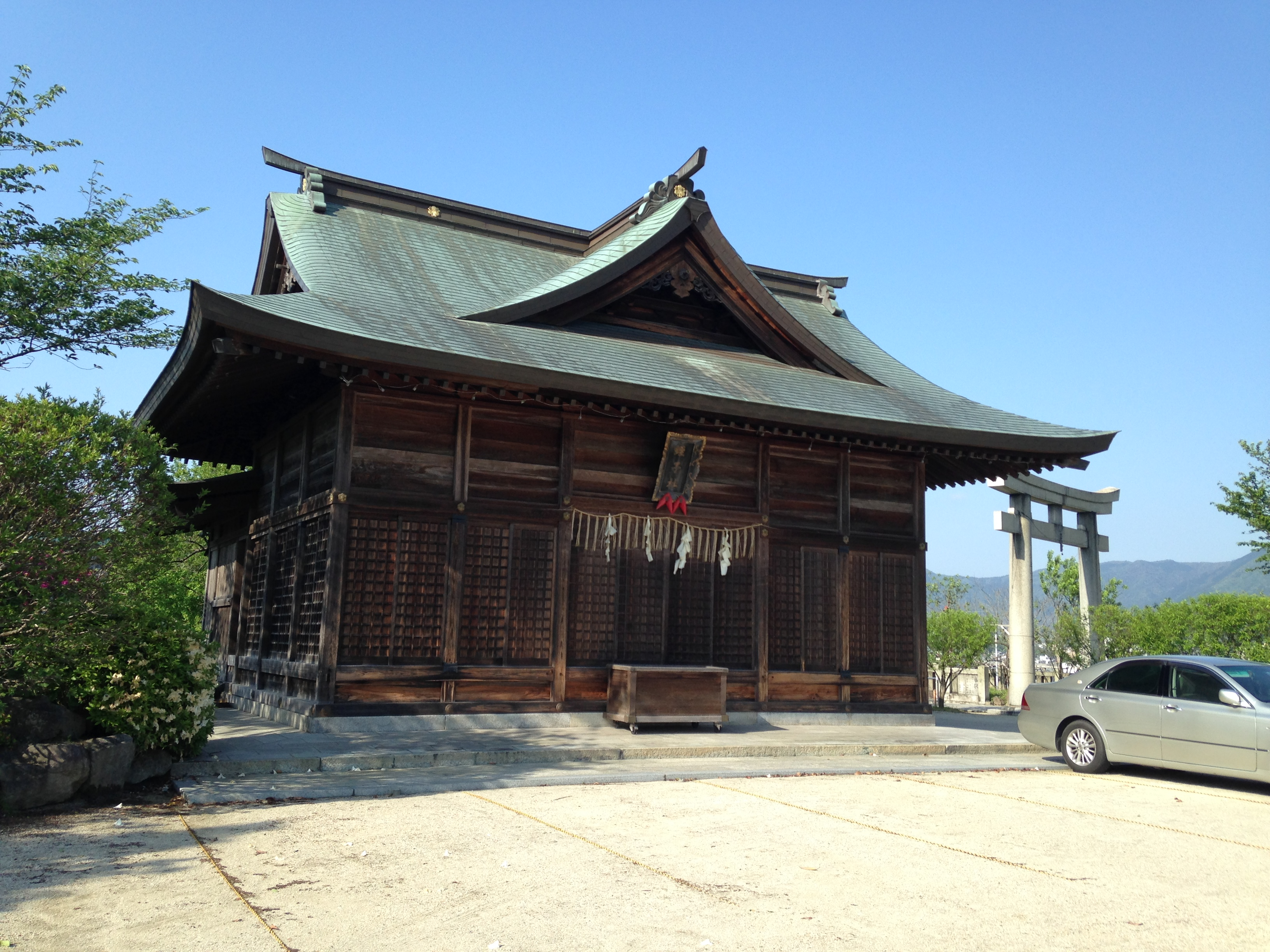 蛭子社と多賀神社の鳥居